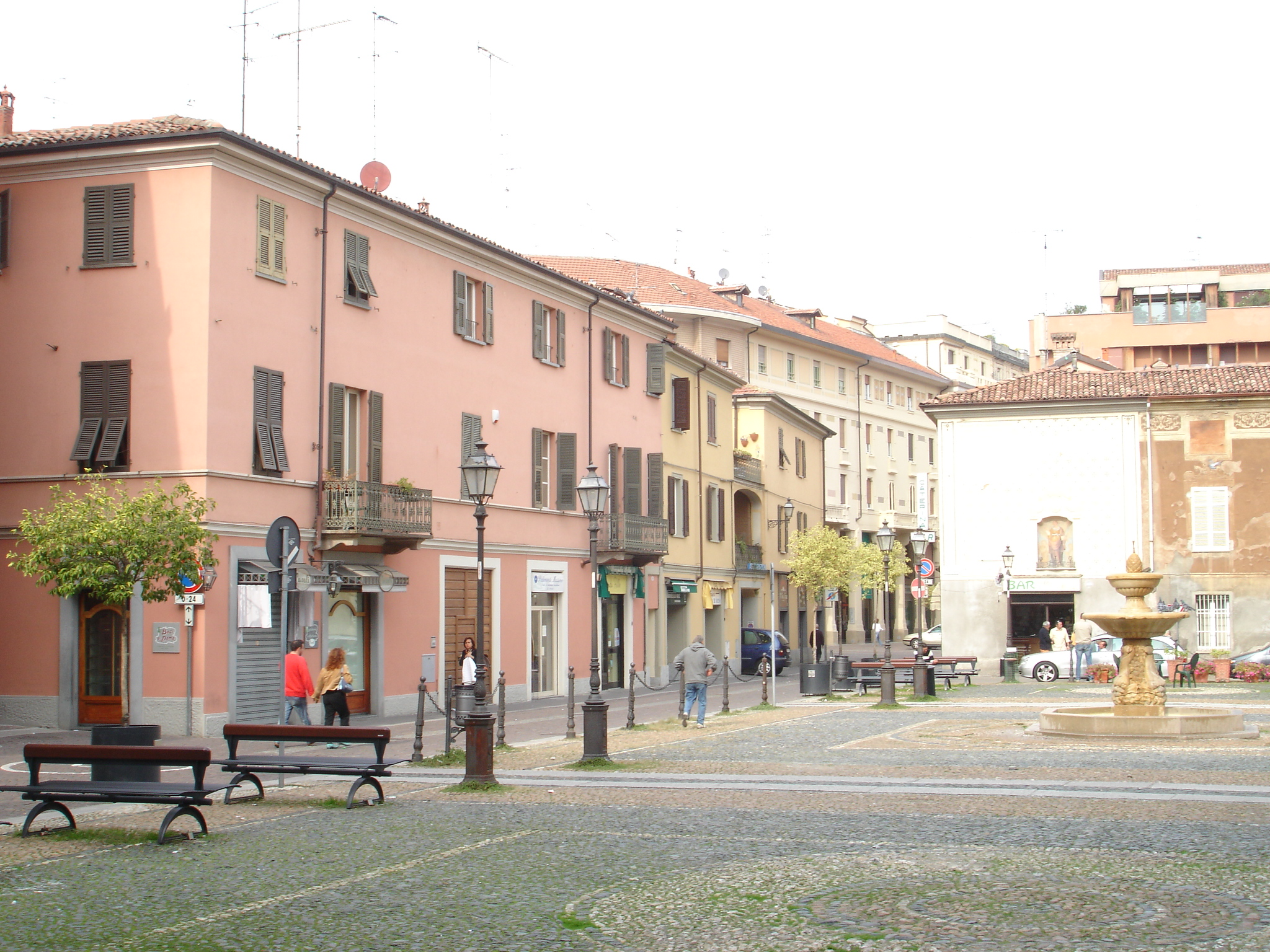 Autore: Tony Frisina - Alessandria